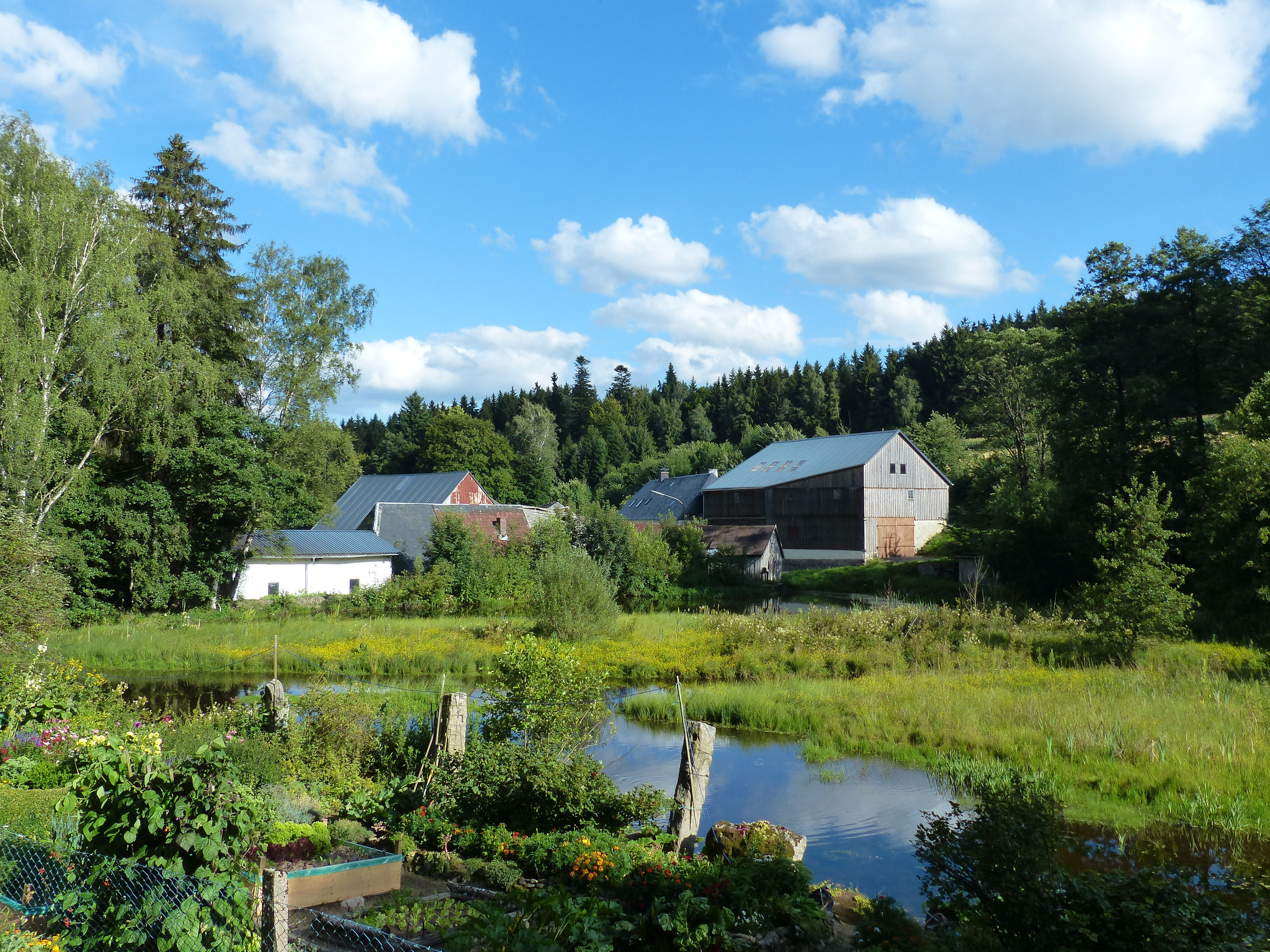 Ortsansichten/Bauwerke von Fichtenhammer